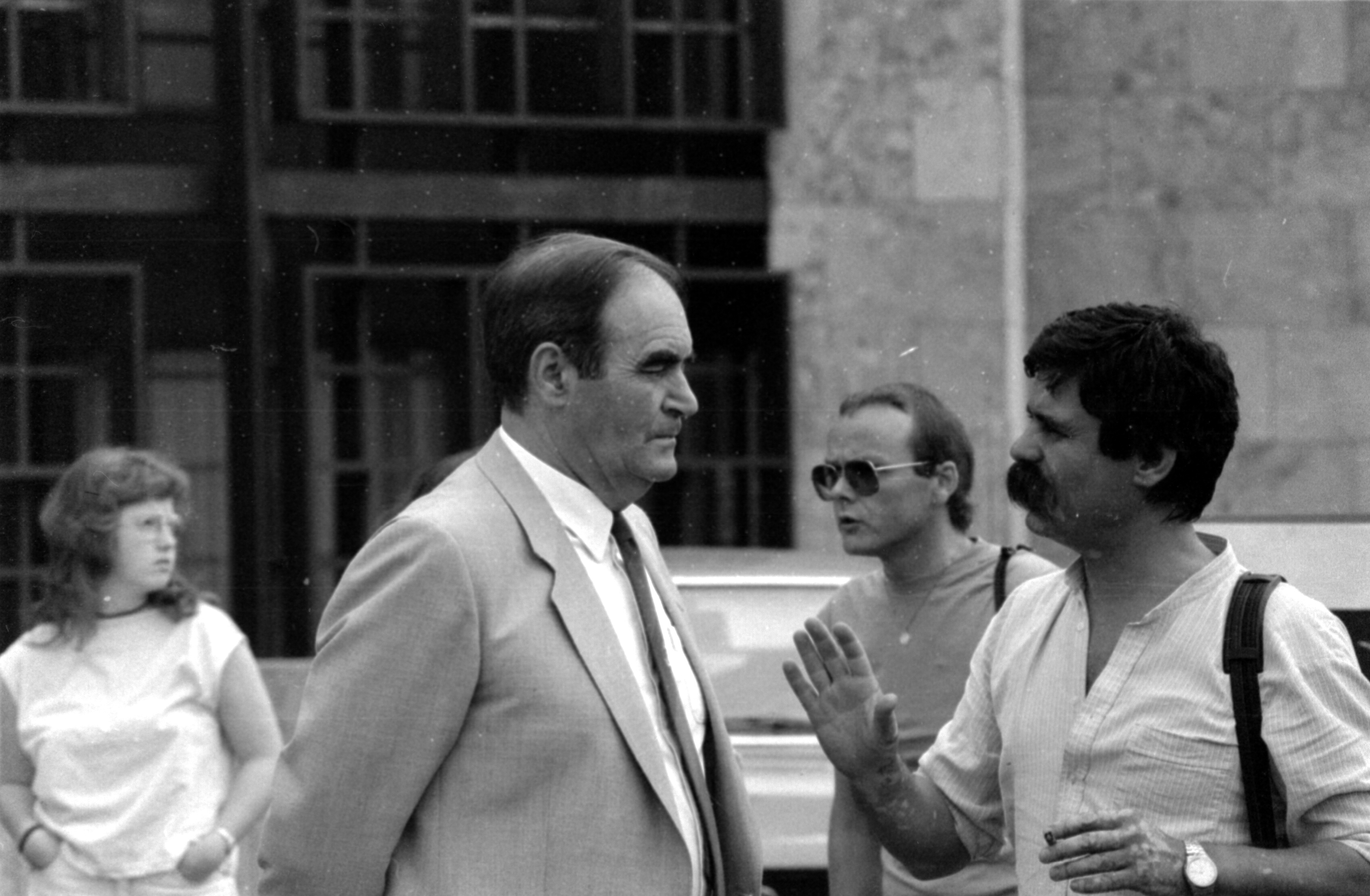 Verstaltung des DGB am 31. August 1985 in Mainz auf dem Rathaus Vorplatz